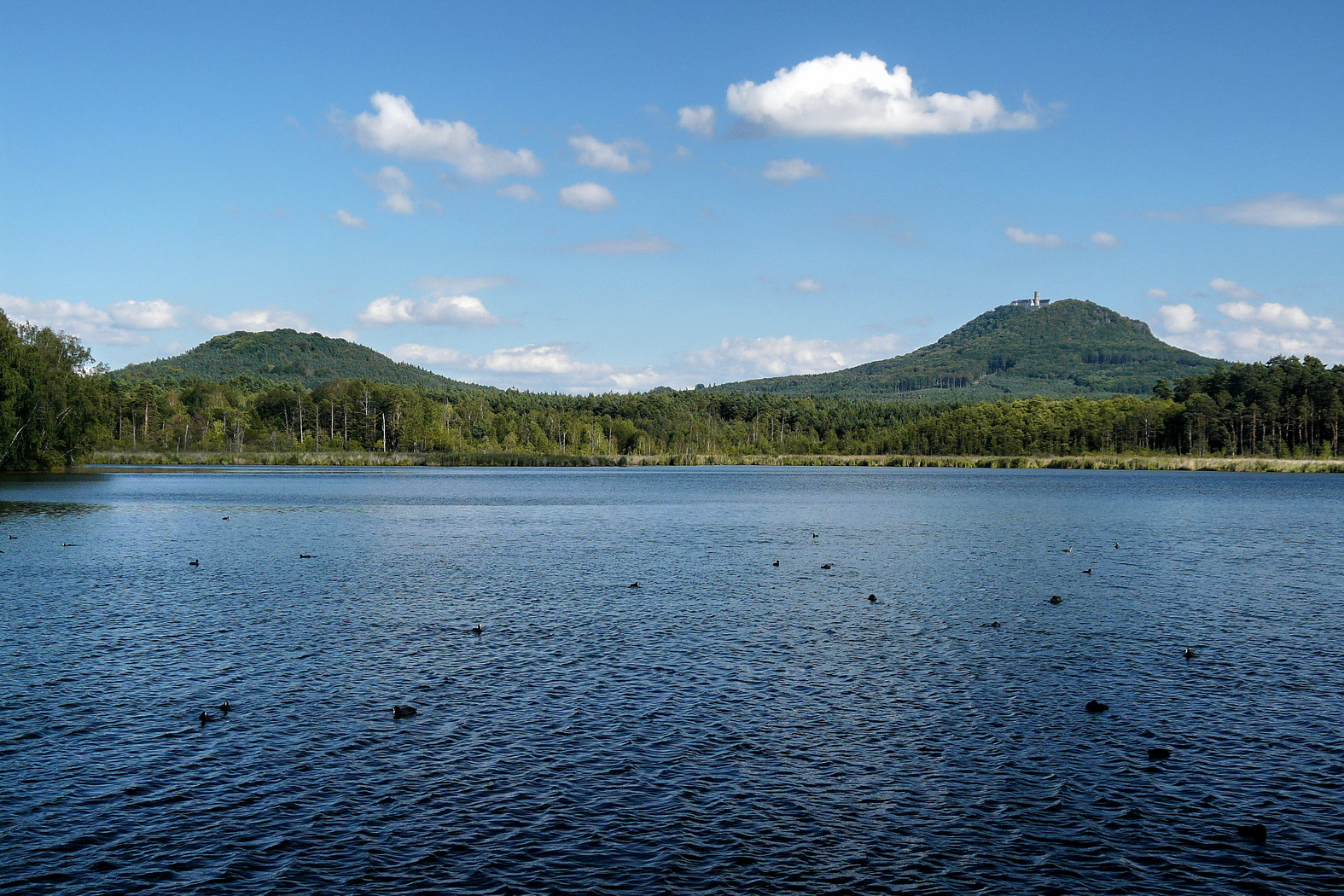 Poselský rybník, vzadu Slatinné vrchy a Malý a Velký Bezděz